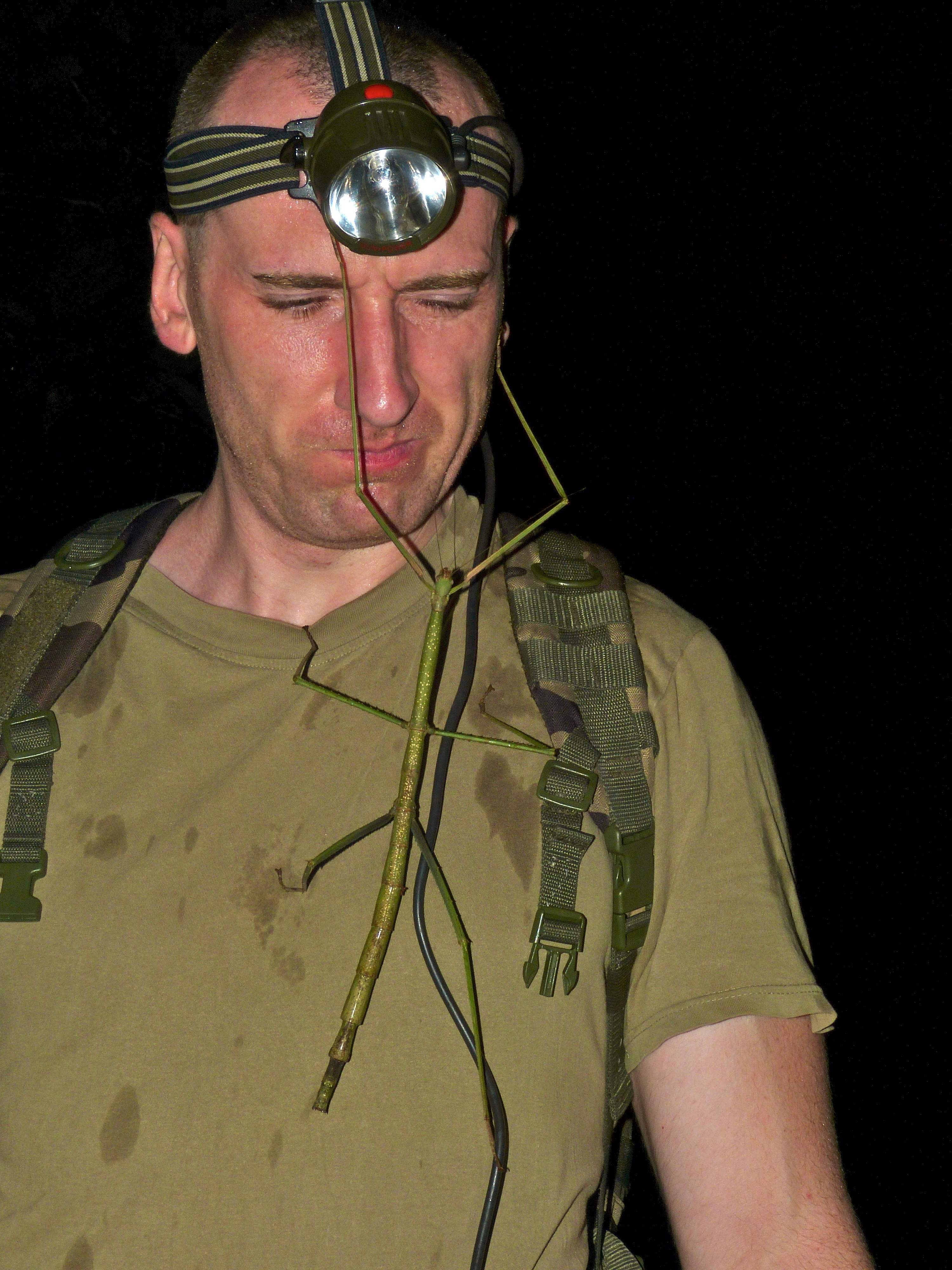 Taman Negara NP, Pahang, MALAYSIA